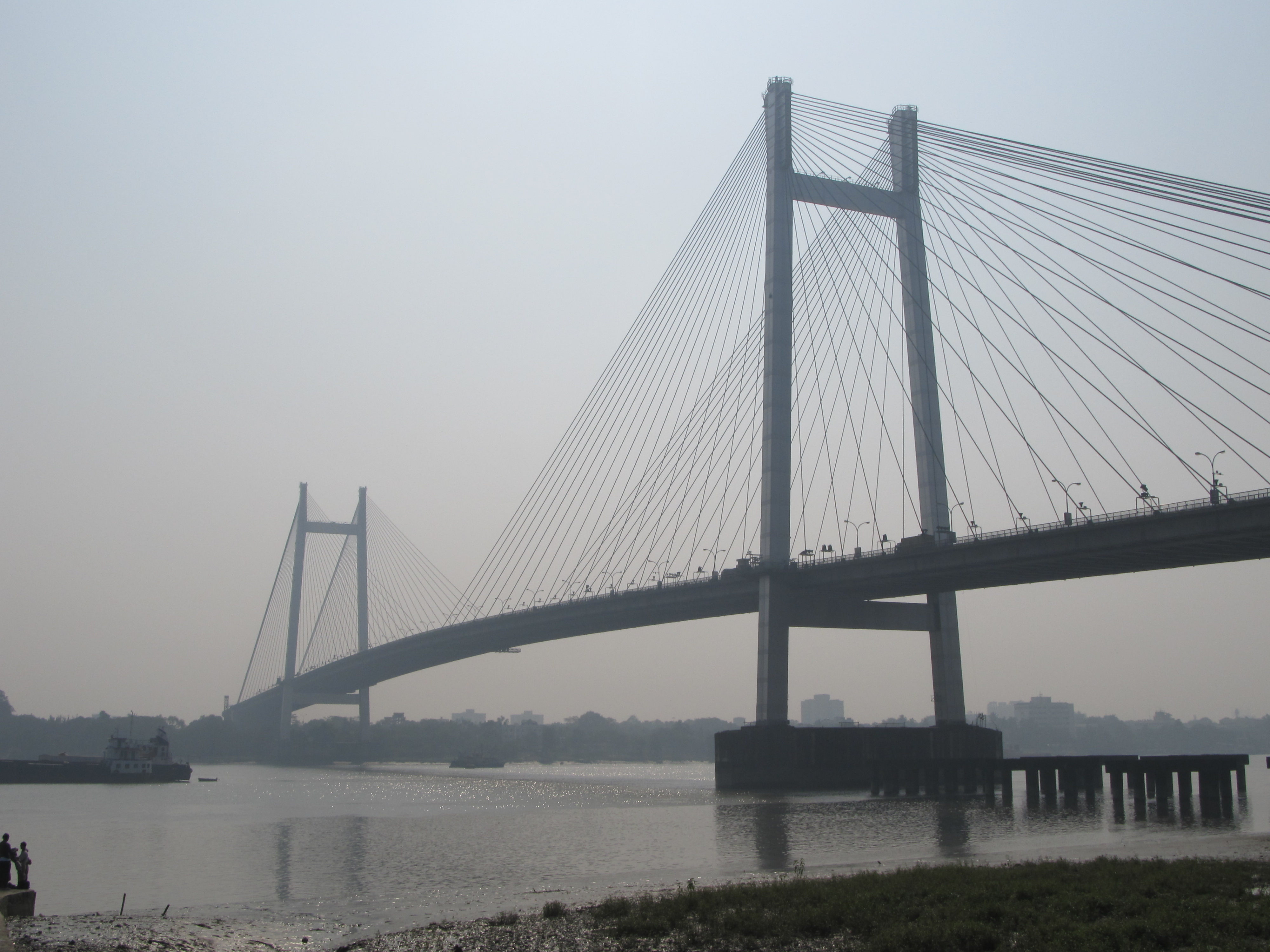 Photographed in Kolkata.